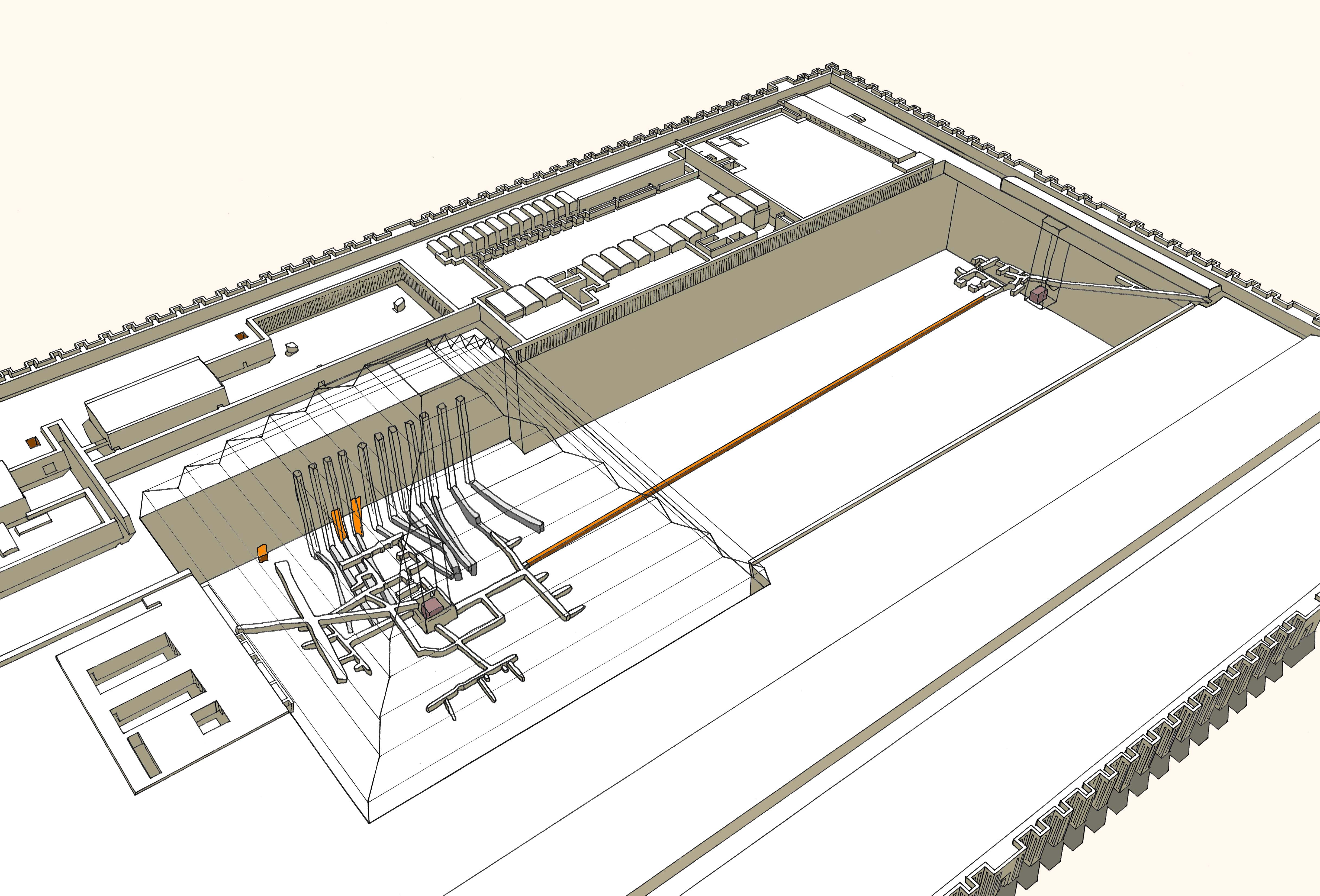 Mise en perspective des découvertes effectuées par la mission lettone de Saqqarah, à l'aide des informations transmises par le directeur Bruno Deslandes